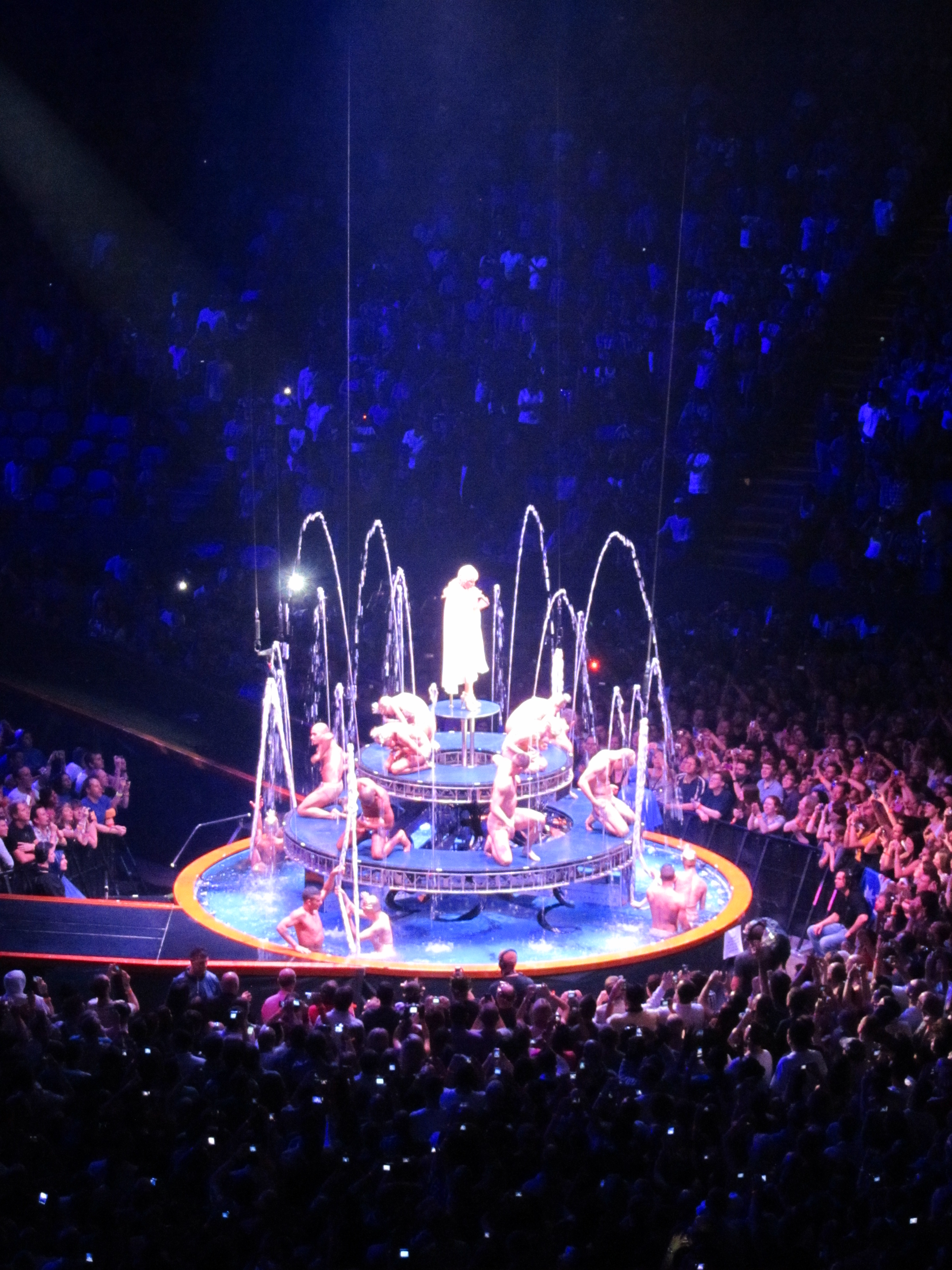 Kylie Minogue interpretando «All the Lover» como canción final del repertorio de Aphrodite Les Folies Tour 2011